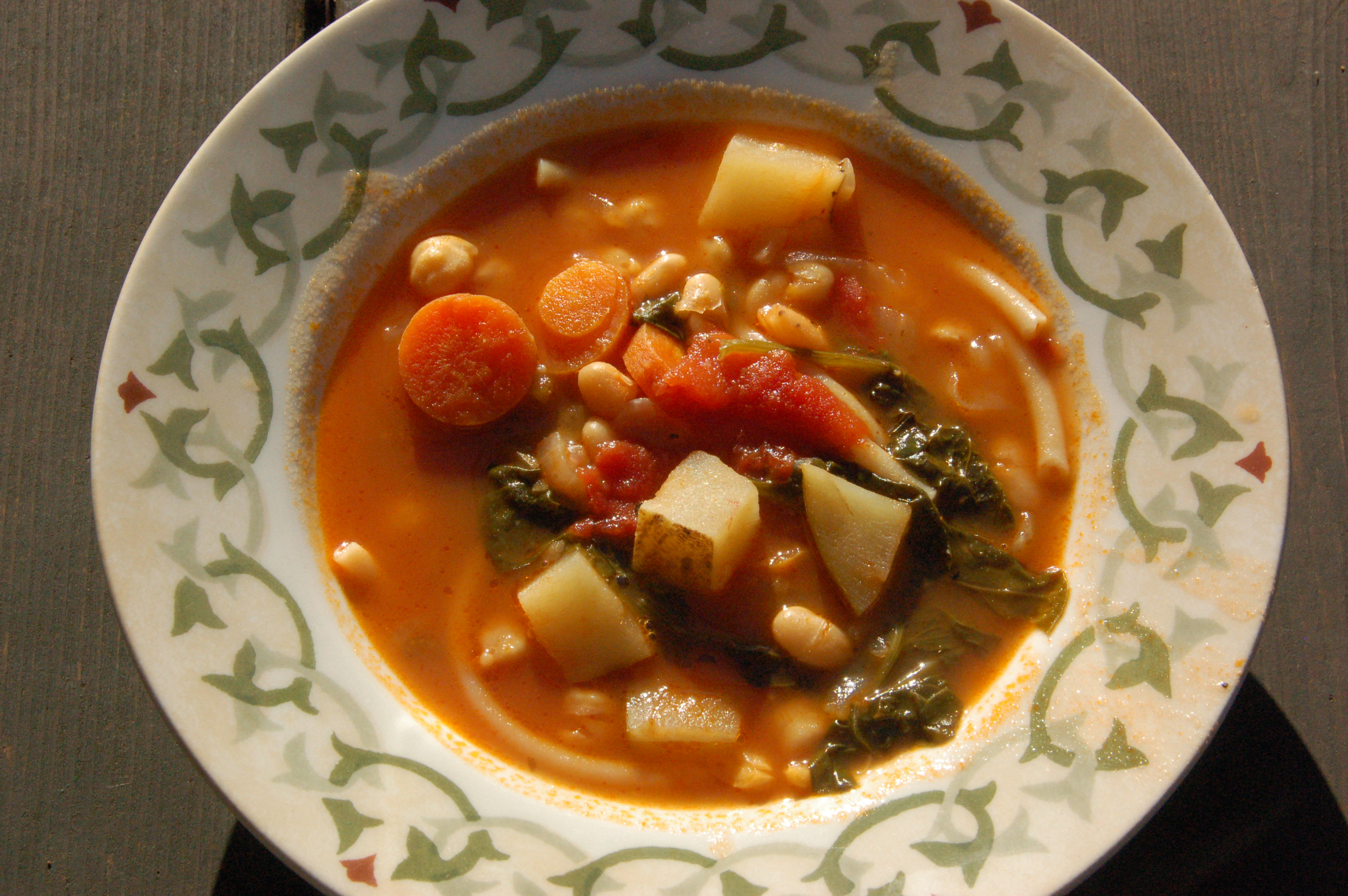 Minestrone soup